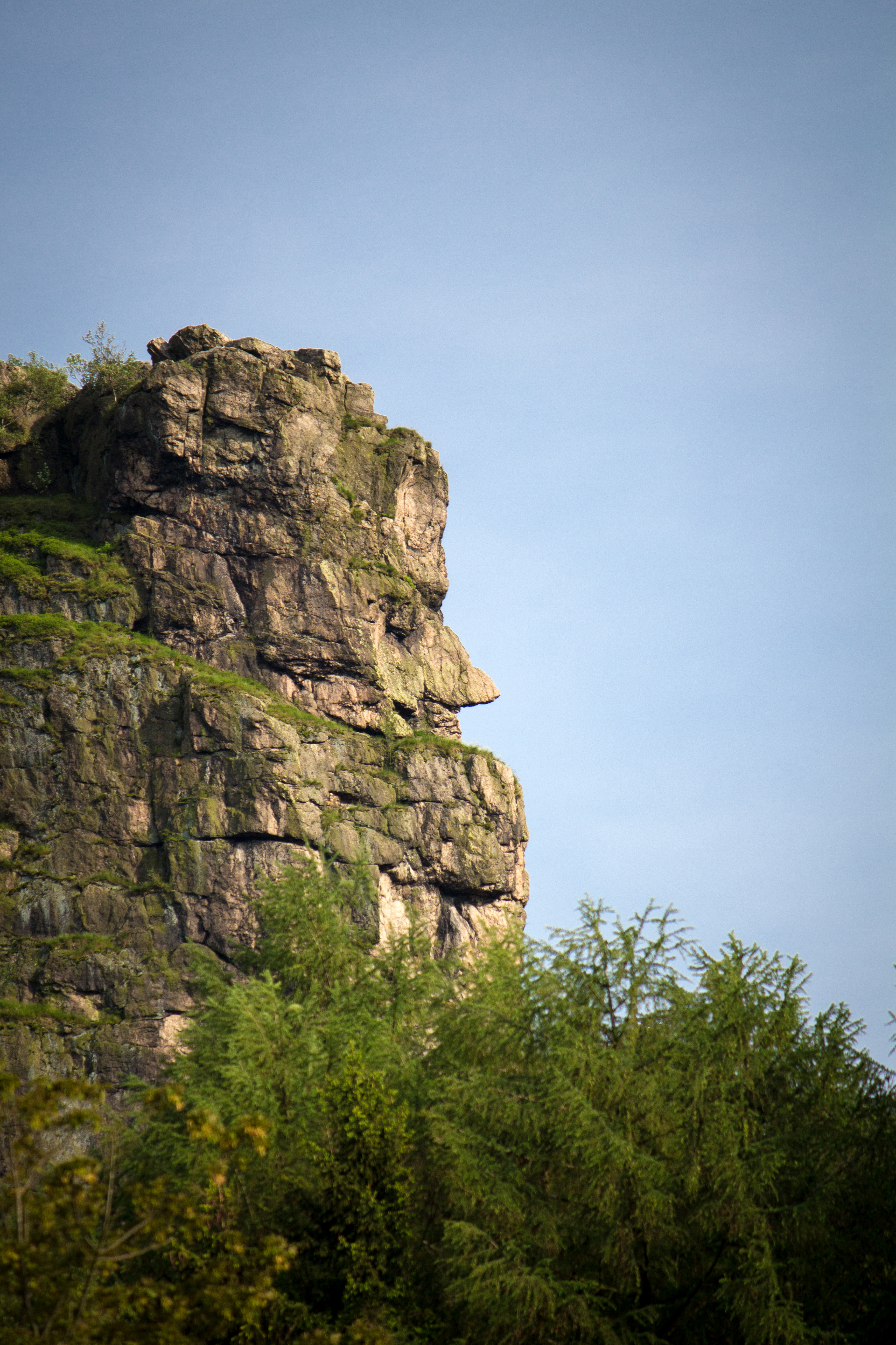 Der „große Kurfürst“ am Goldstein, Bruchhauser Steine, Olsberg, Hochsauerlandkreis, Nordrhein-Westfalen